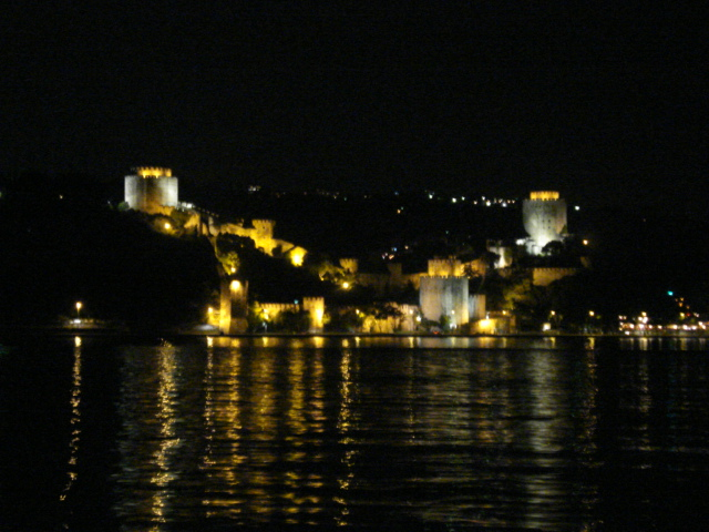 Rumeli Hisarı, a fort in İstanbul, Türkiye seen from Bosphorus